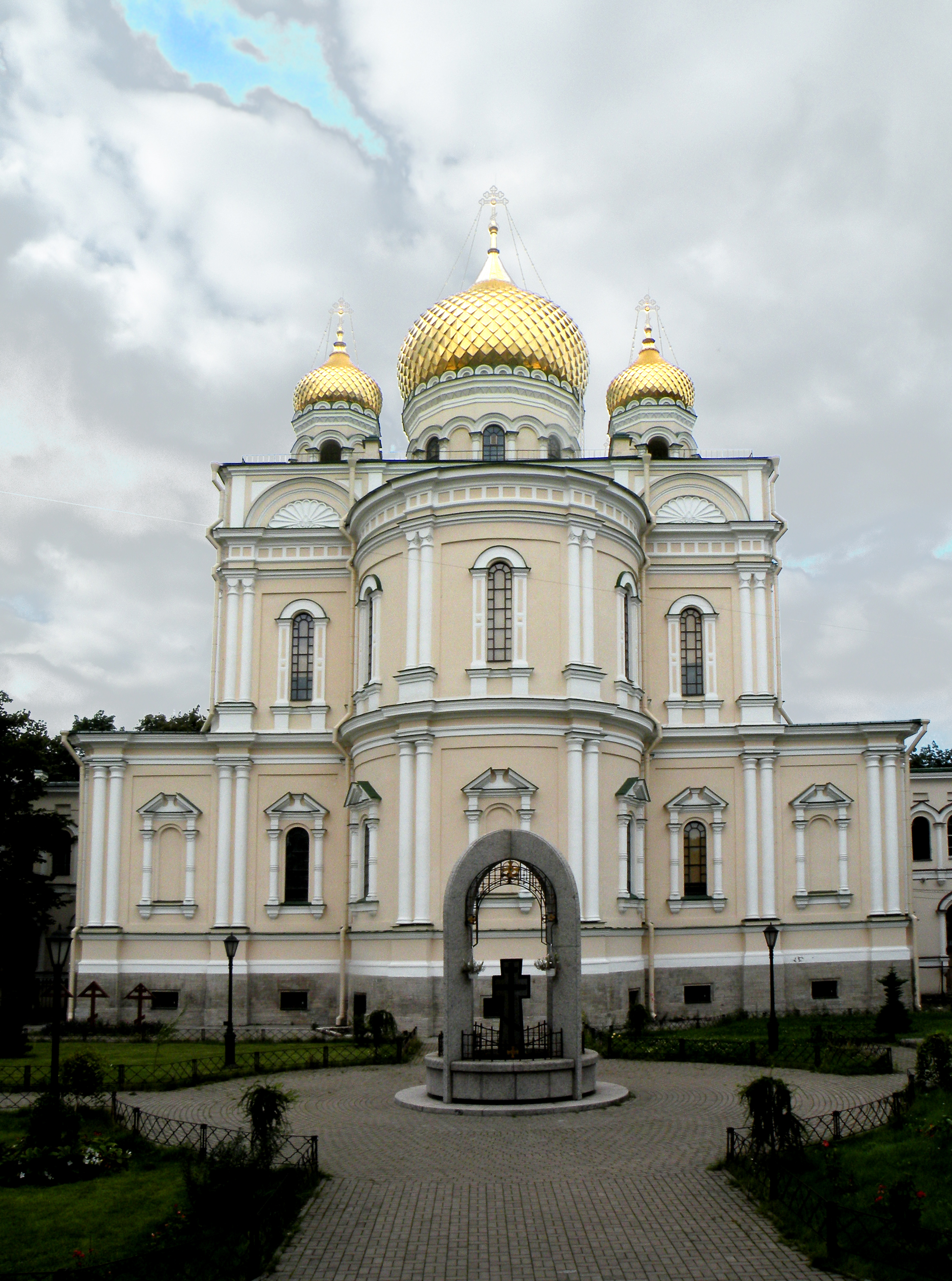 Собор Ново-Девичьего монастыря